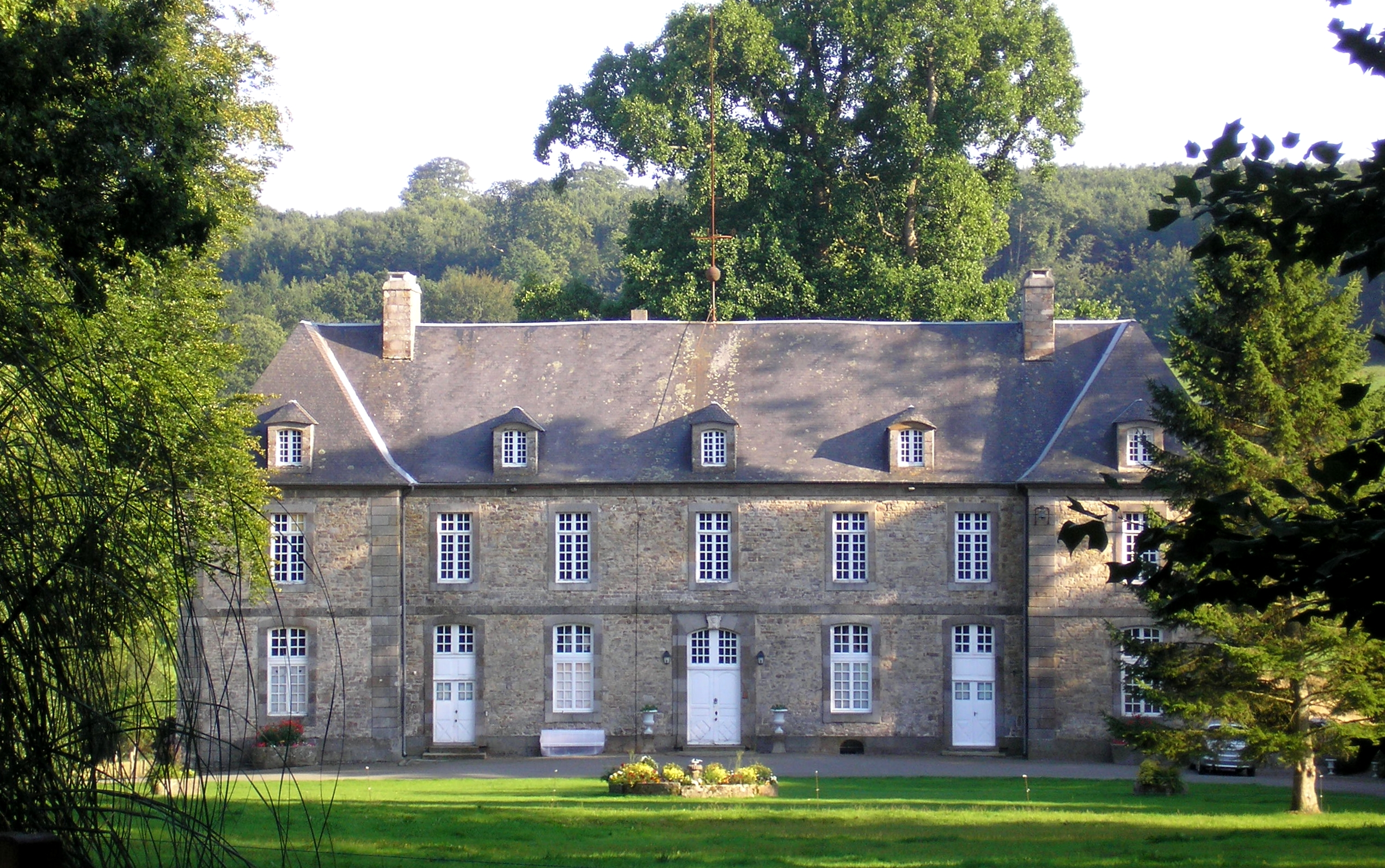 La Lande-d'Airou (Normandie, France). Le château.